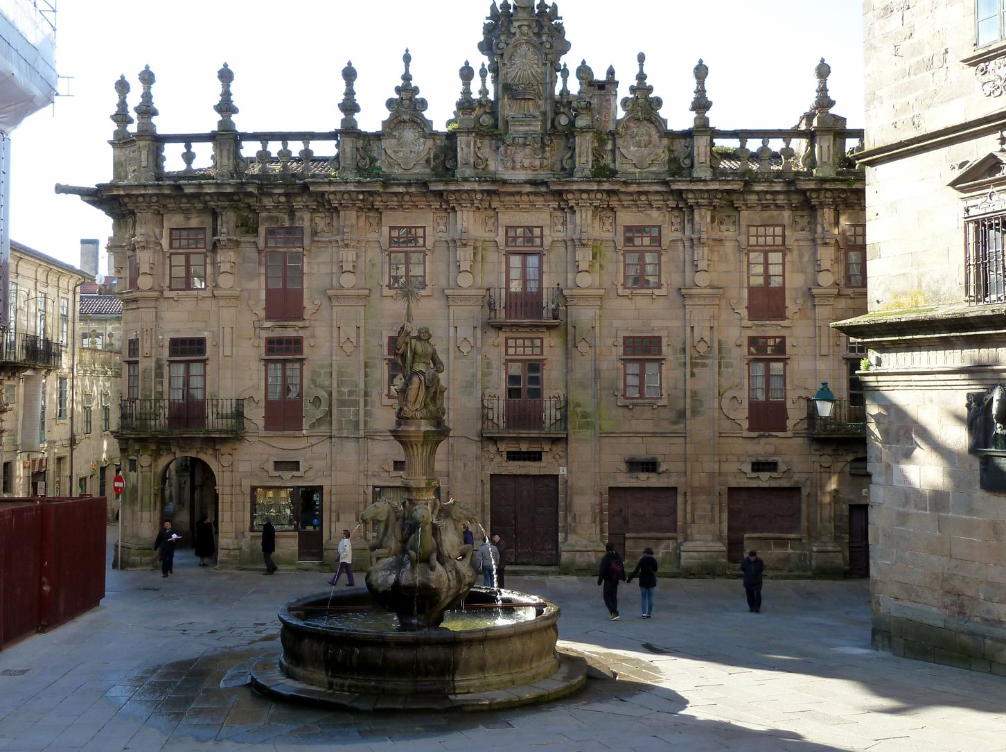 Fachada de la Casa del Cabildo antes de su rehabilitación por parte del Consorcio de Santiago. Enero de 2011.